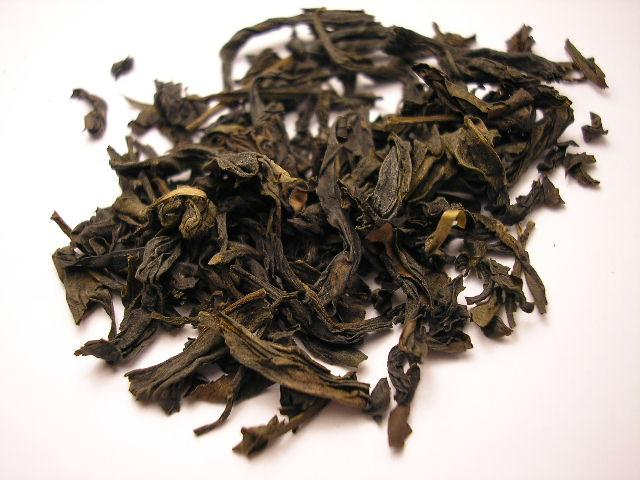 jin Fo tea